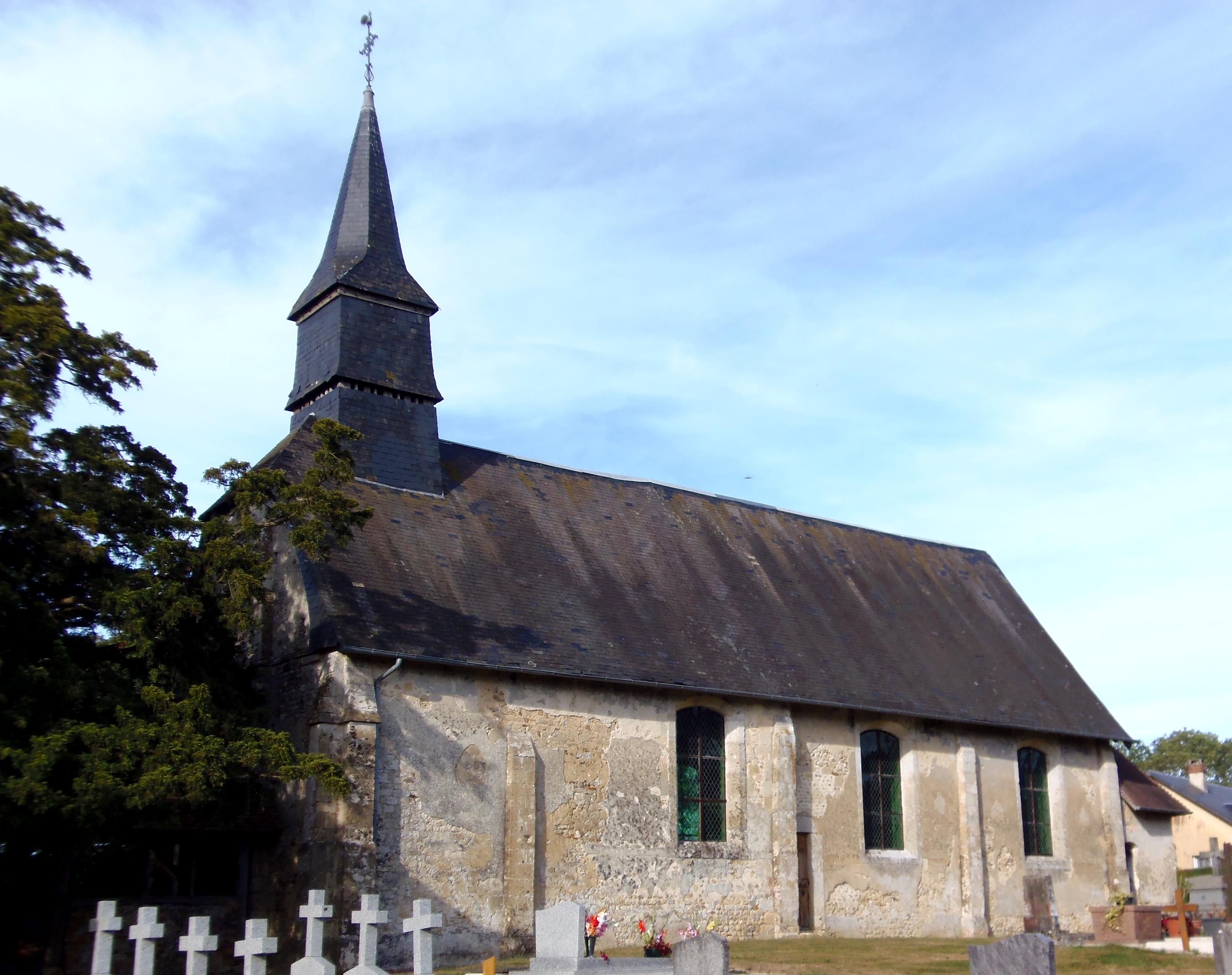 La Boissière (Normandie, France). L'église Notre-Dame.